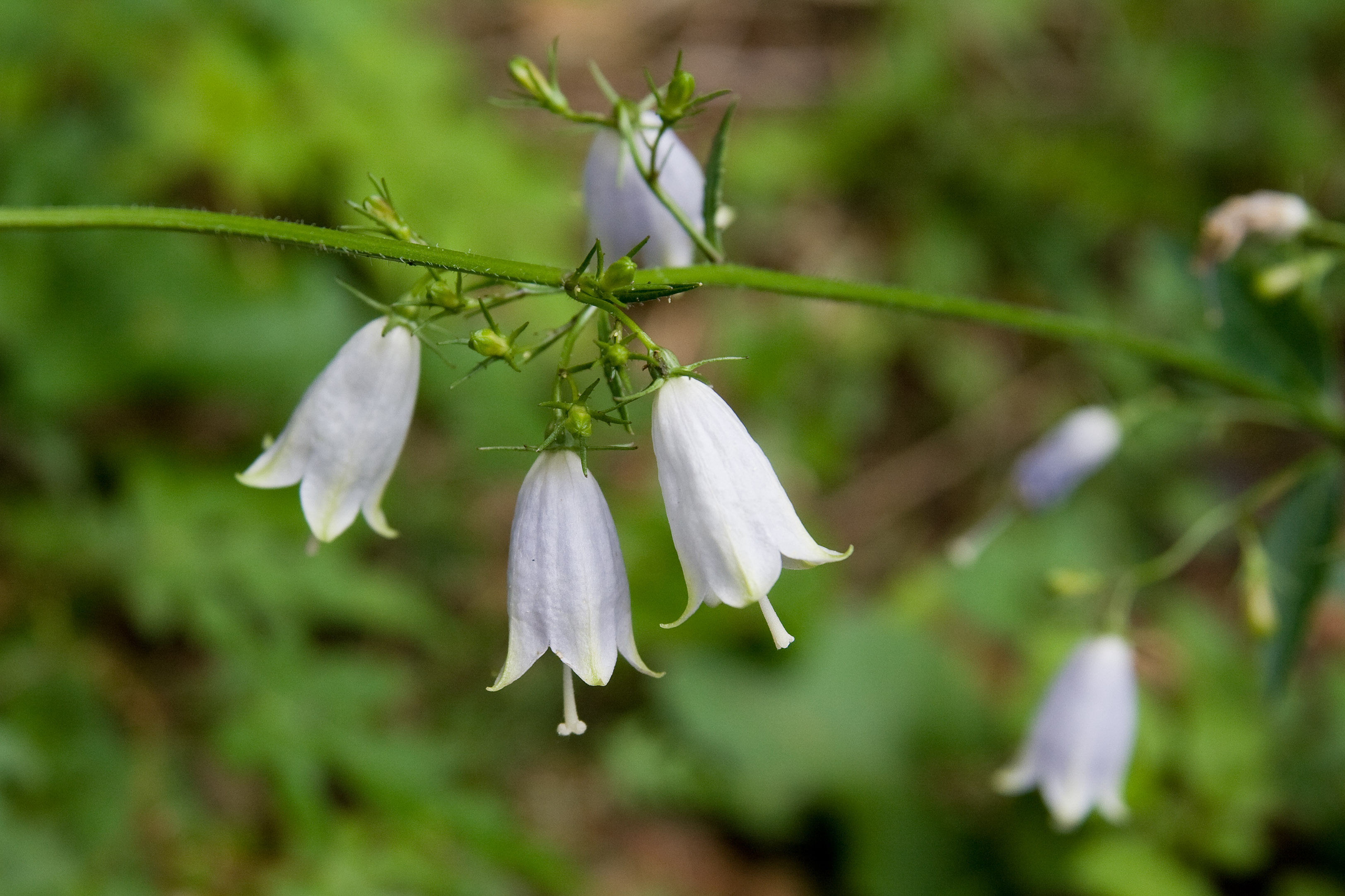 ツリガネニンジン (学名：Adenophora triphylla var. japonica）